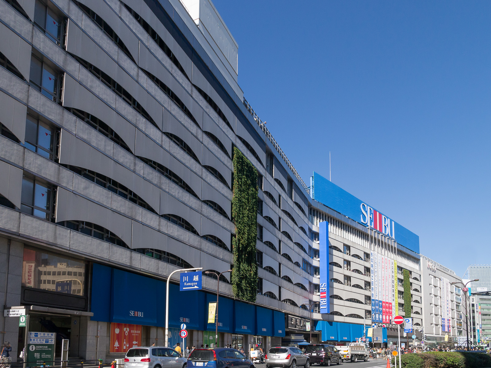 西武百貨店池袋店、池袋駅。